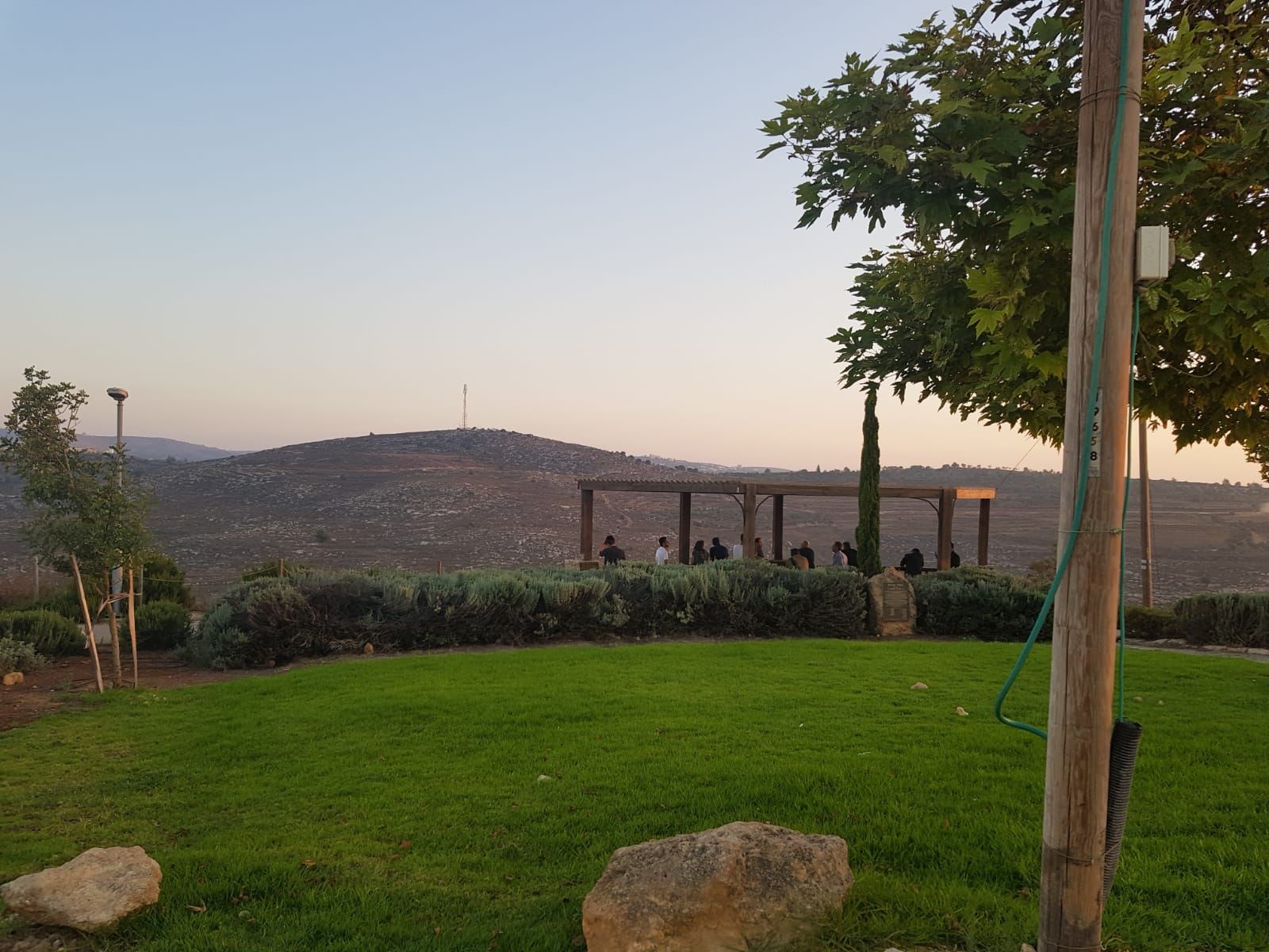 נחל שילה